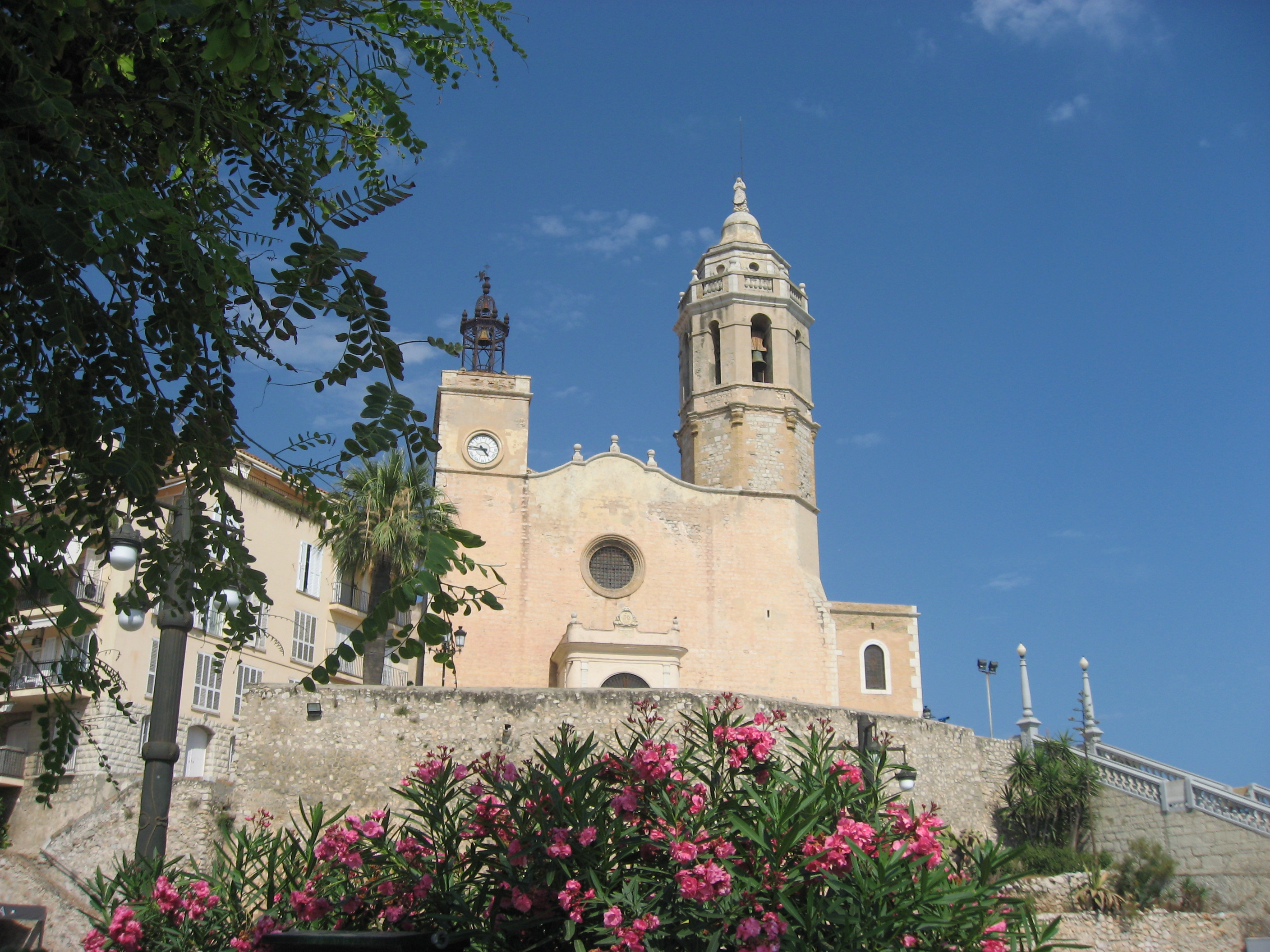 Sant Bartolomeu i Santa Tecla Iglesia Church Sitges Spain